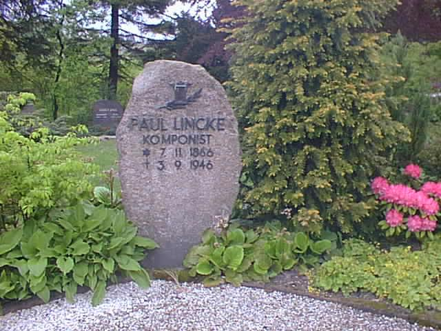 Der Grabstein von Paul Lincke im Friedhof Hahnenklee.